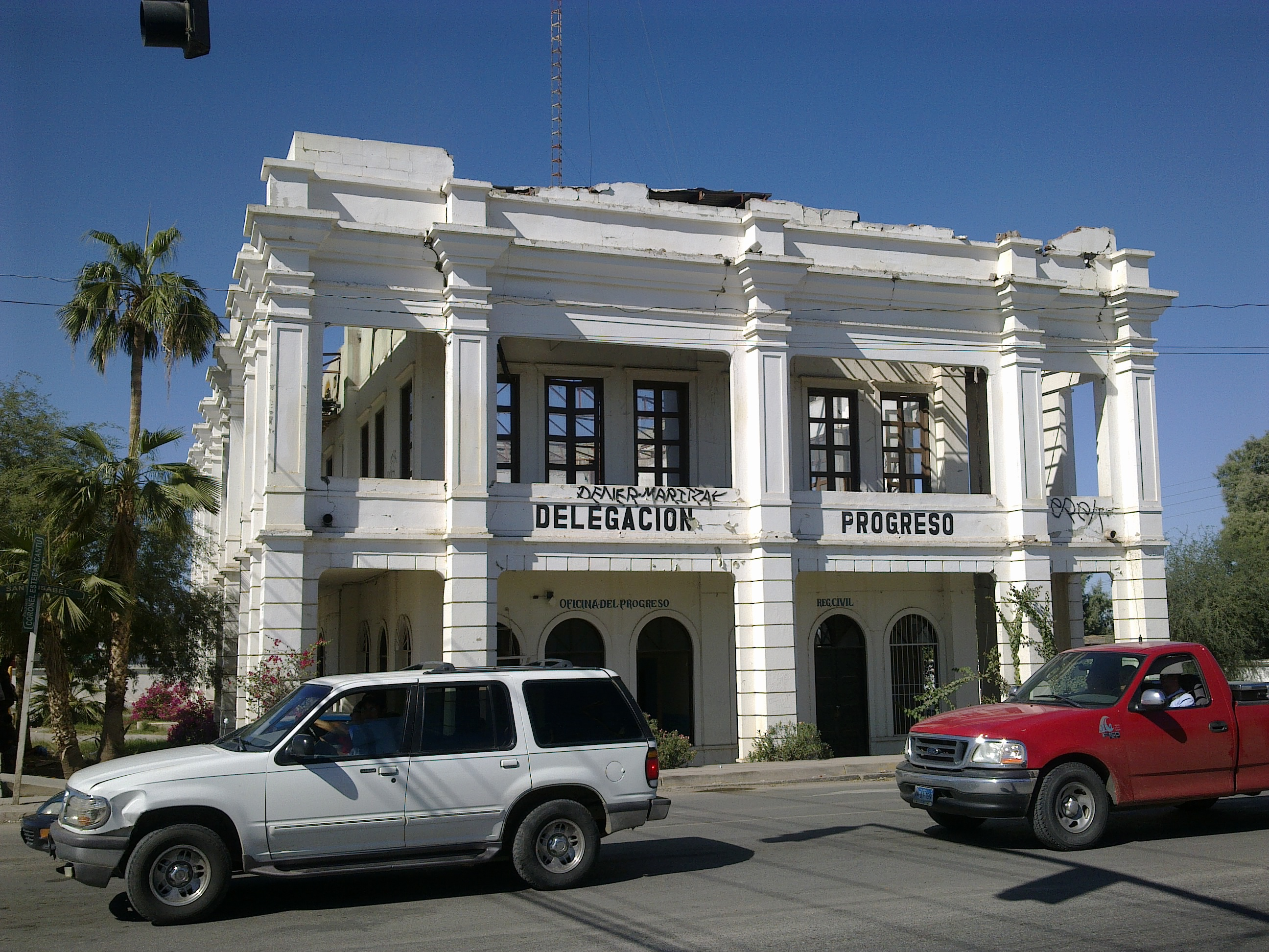 Aquí se muestra la cara este, del edificio histórico de la localidad de Progreso, B. C., que albergó las oficinas de la delegación municipal del mismo nombre. En esta foto, se encuentra el edificio en estado de abandono, pues fue desalojado después del terremoto del 4 de abril del 2010, más de 3 años antes de ser tomada la foto.